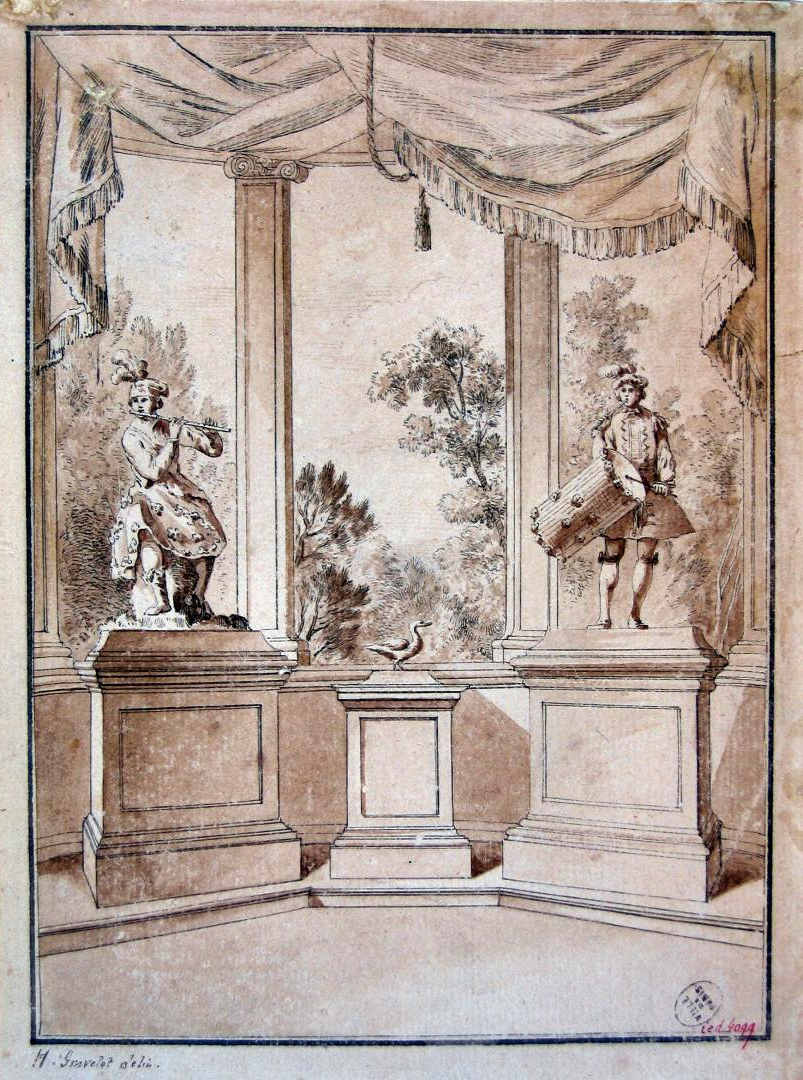 Dessin préparatoire. Plume et lavis, signé en bas à gauche; 0,182x0,132. Musée Carnavalet, inv. D.4099.